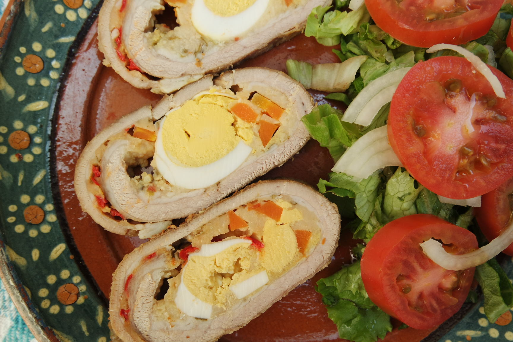 Matambre vacuno arrollado con ensalada mixta (Lechuga, cebolla y tomate) Plato típico ríoplatense.